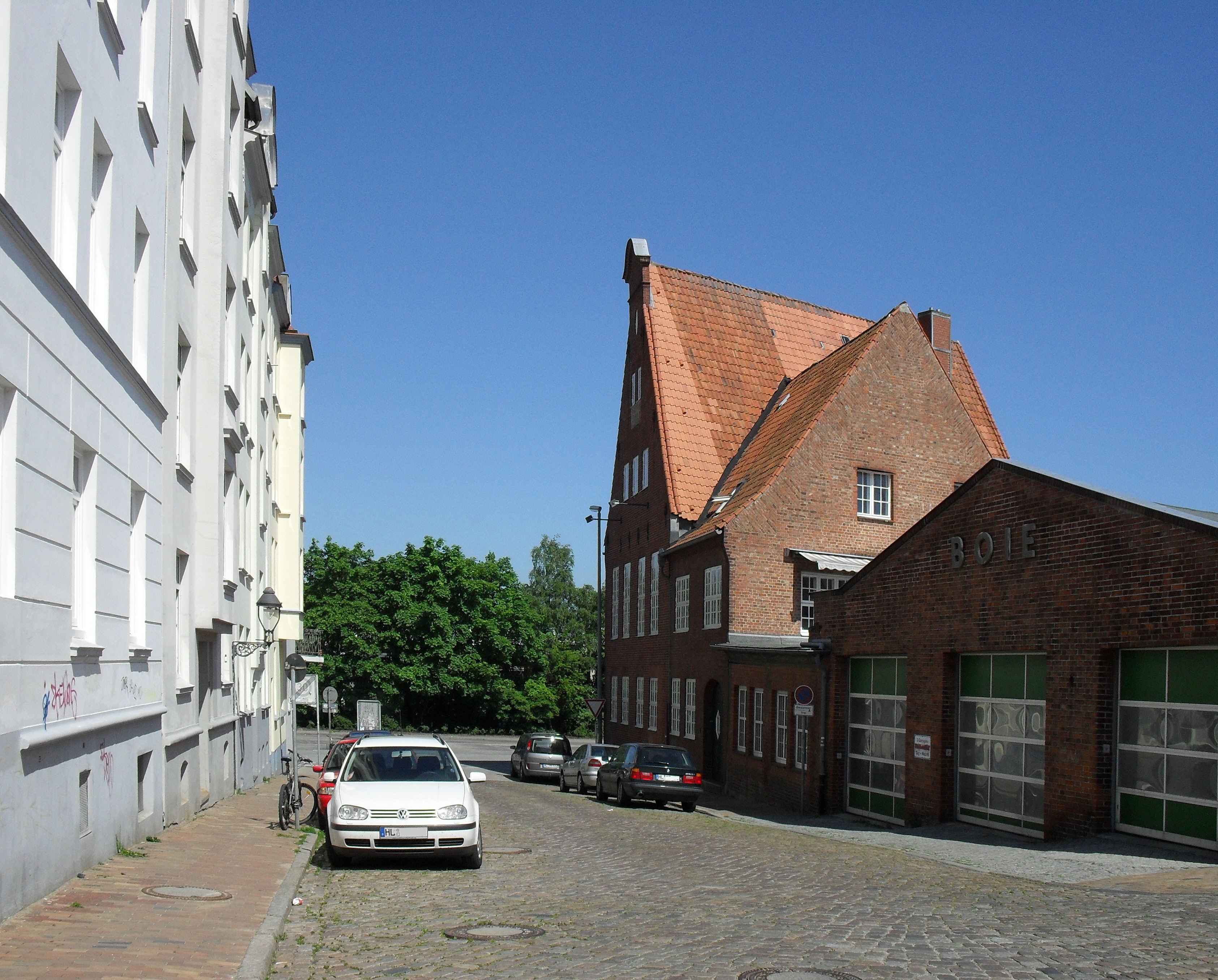 Die Rosenpforte in Lübeck